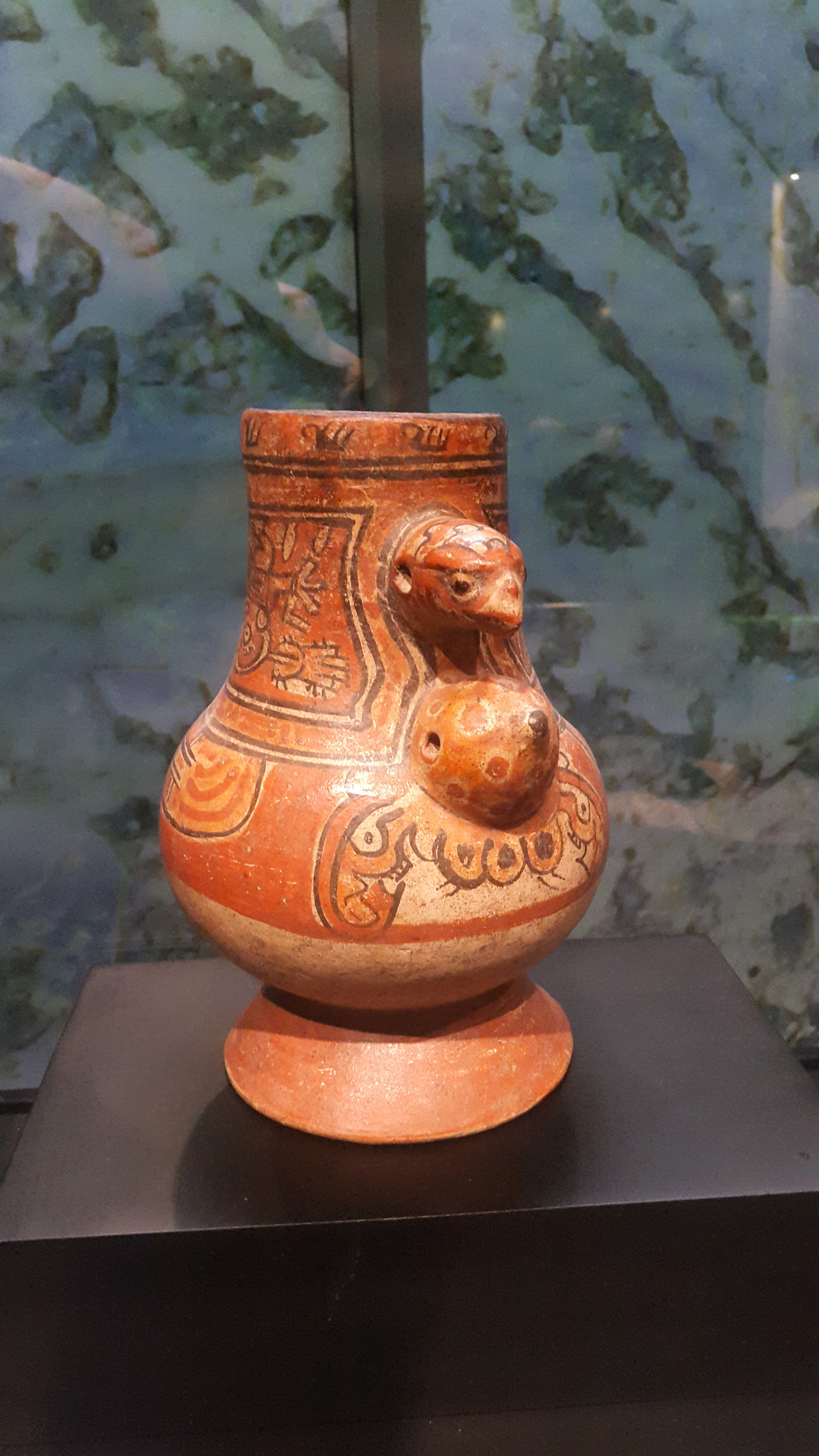 Vasija policromada de Nicoya con forma de chompipe, con decorados mesoamericanos, estilo Papagayo. Museo del Jade. Costa Rica.